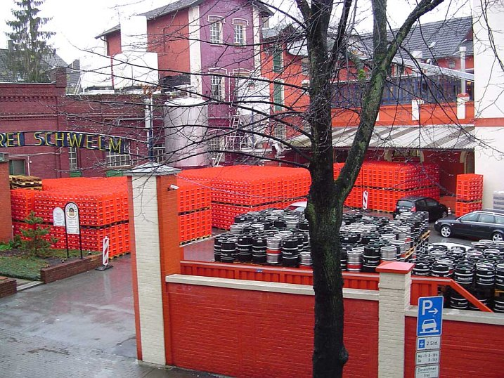 Blick auf die Brauerei Schwelm, Hofeingang Neumarkt 1.